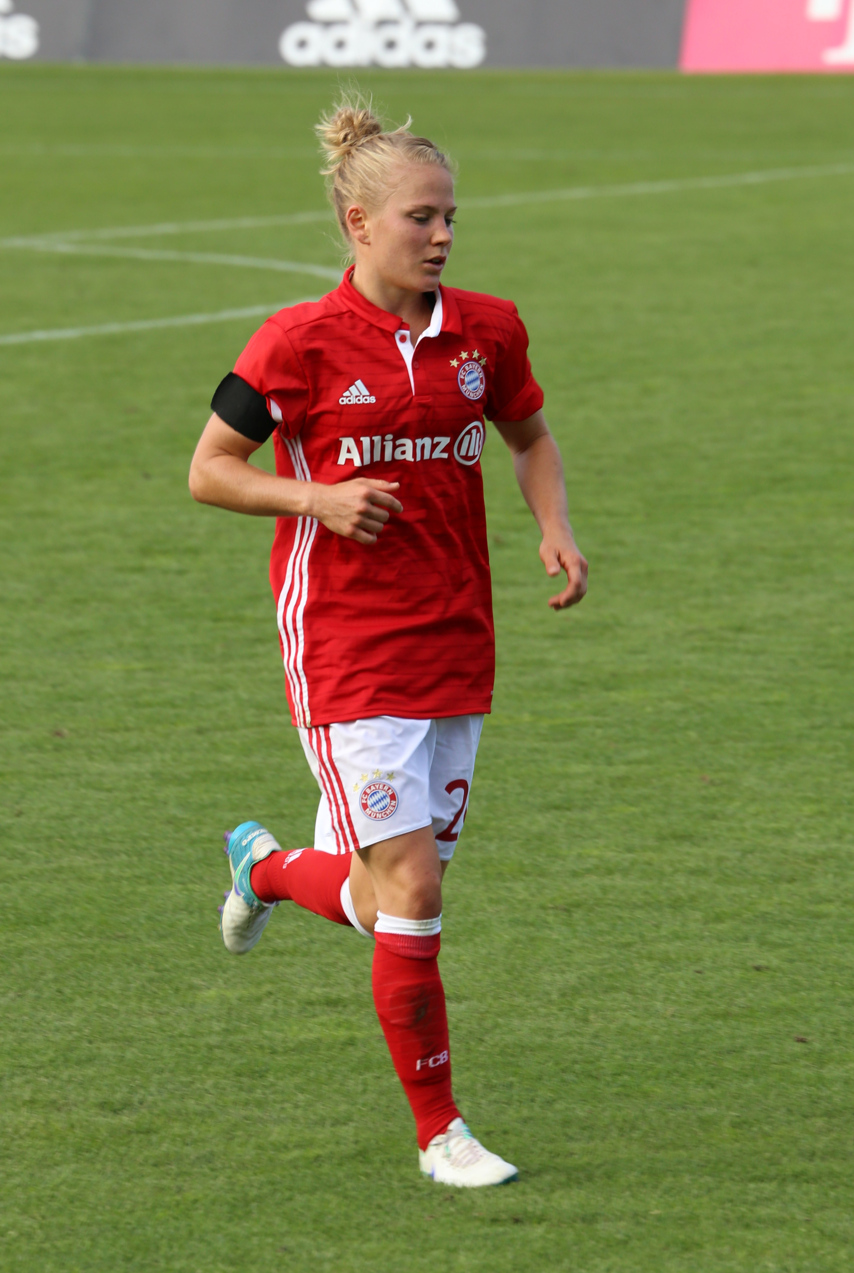 Leonie Maier, FC Bayern München, beim Frauen-Bundesliga-Spiel FC Bayern München gegen SC Freiburg am 3. September 2016 im Stadion an der Grünwalder Straße (Ergebnis war 1:1).